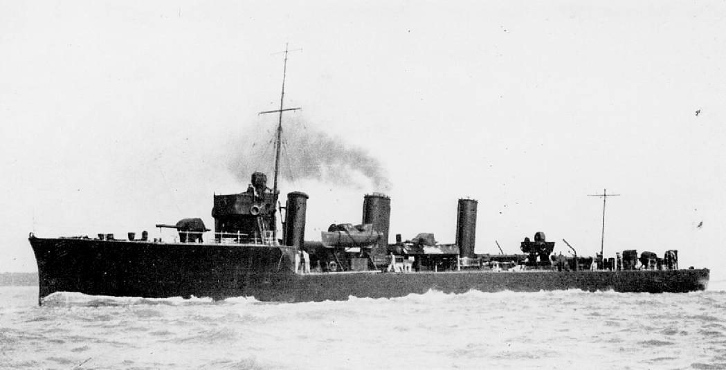 Der britische Zerstörer HMS ARDENT der Acasta-Klasse